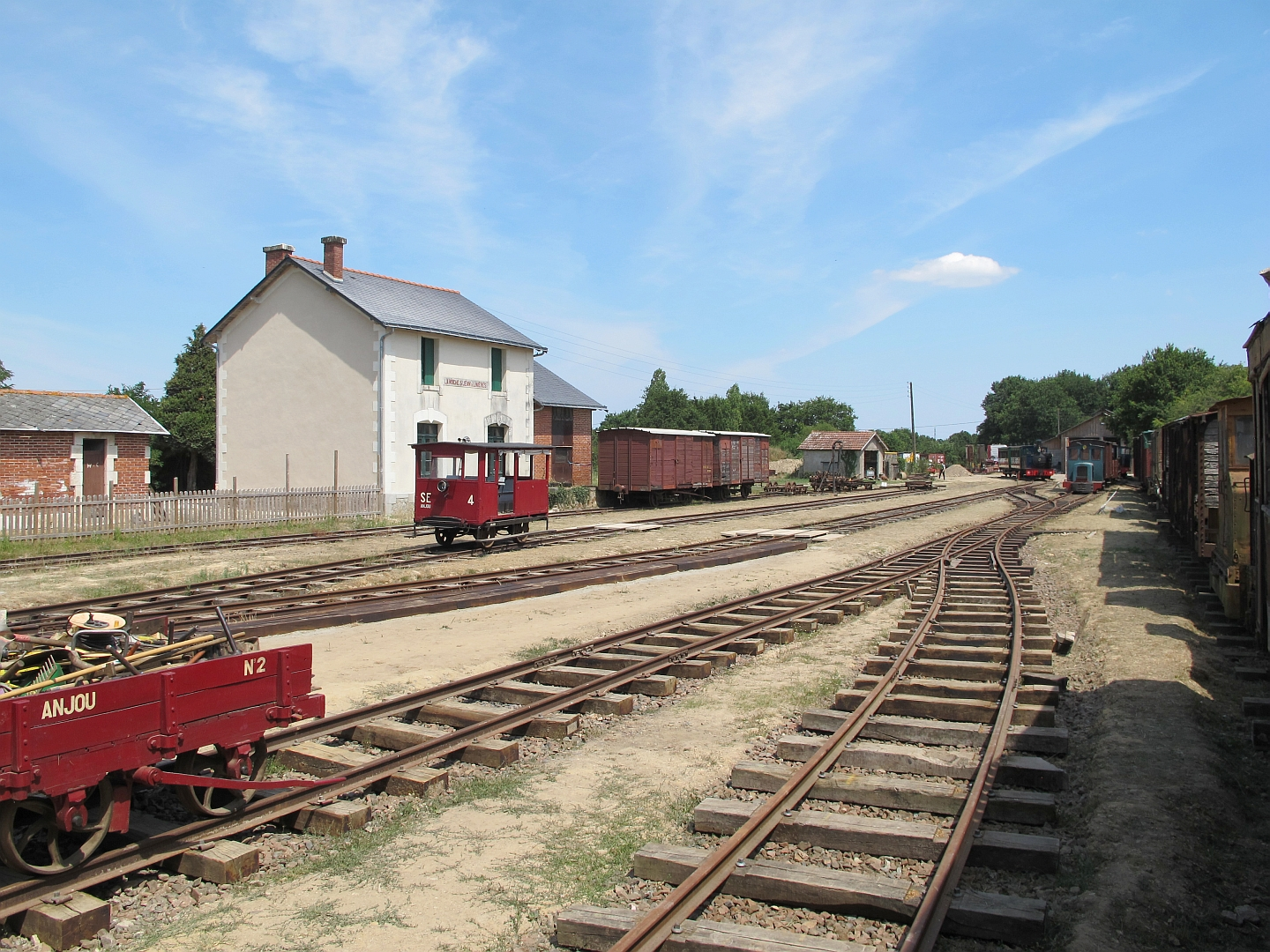 La gare de La Roche Saint-Jean de Linières (Maine-et-Loire), le 7 juillet 2019.